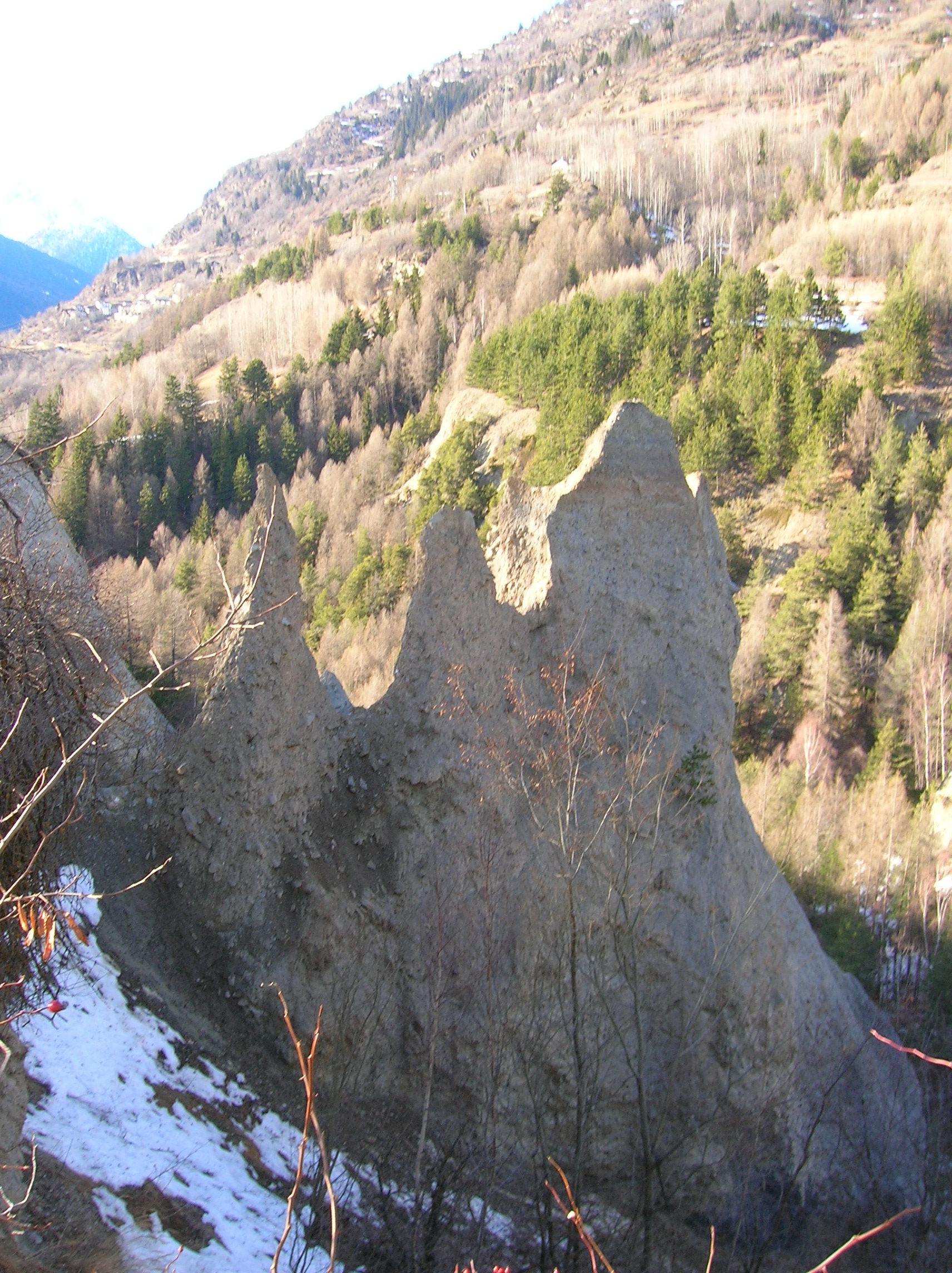 Saint-Nicolas, Valle d'Aosta, Italia.